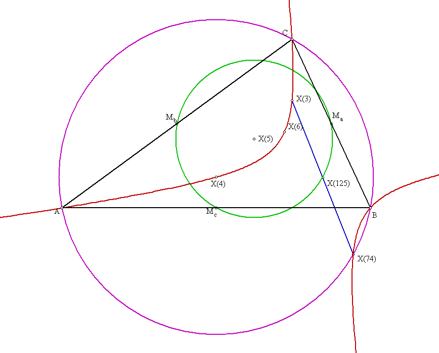 Jerabek Hyperbola